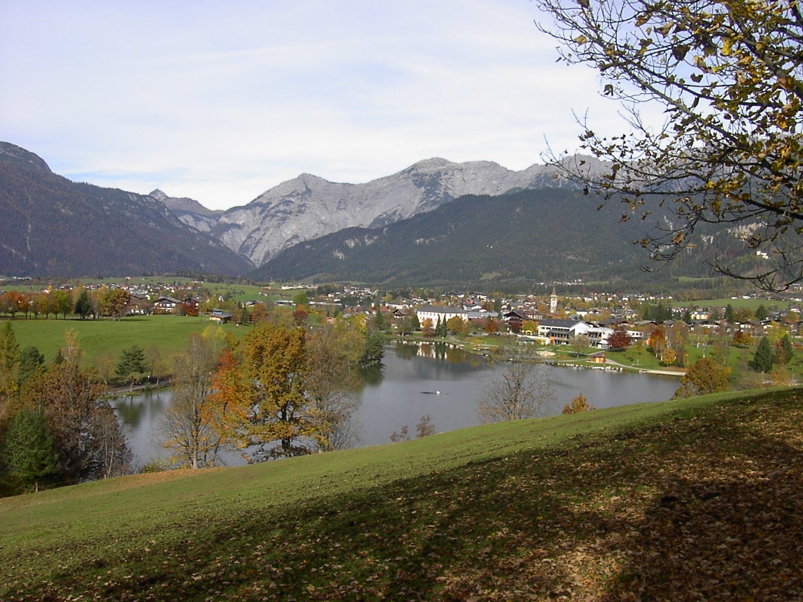 eigene Digitalfotografie